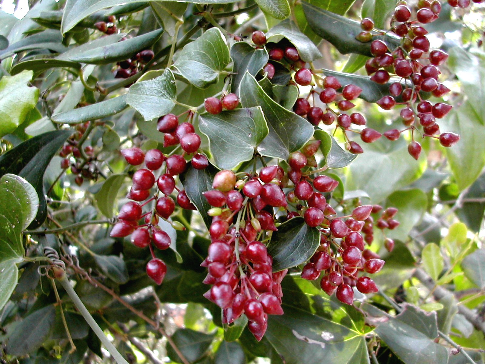 Smilax aspera